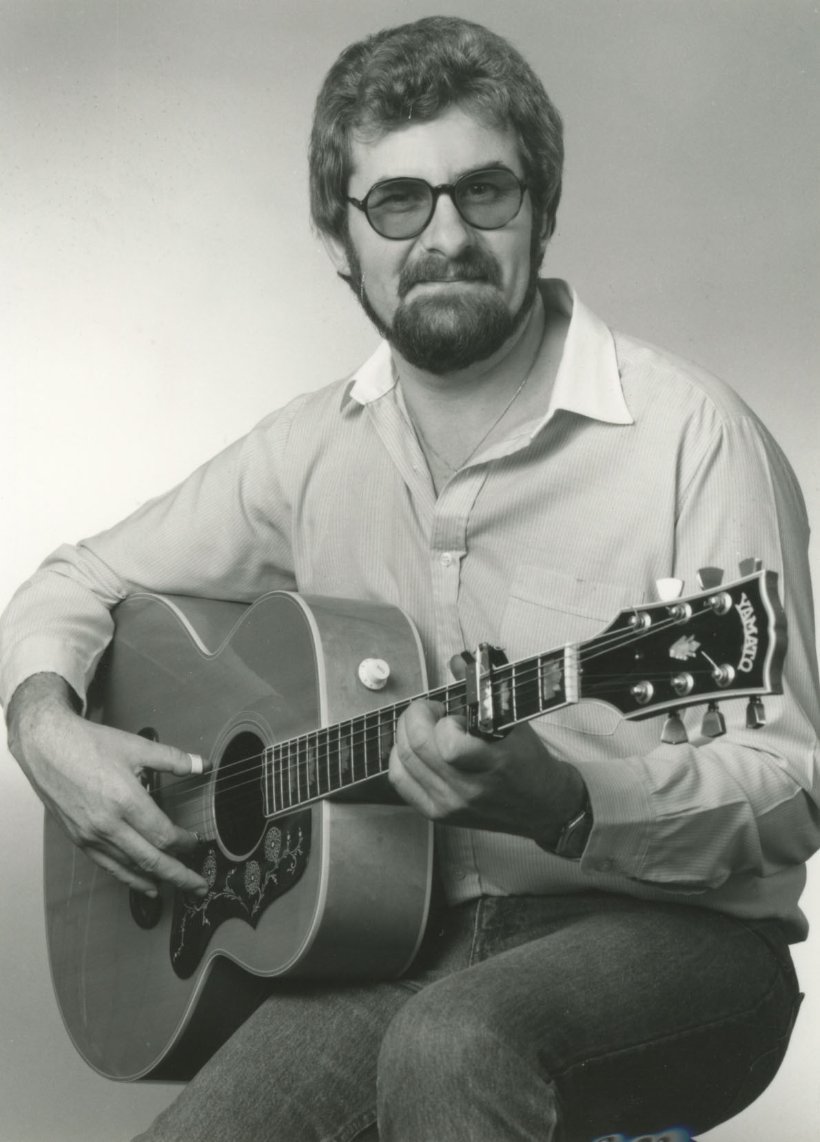 Manfred Ulrich - Porträt